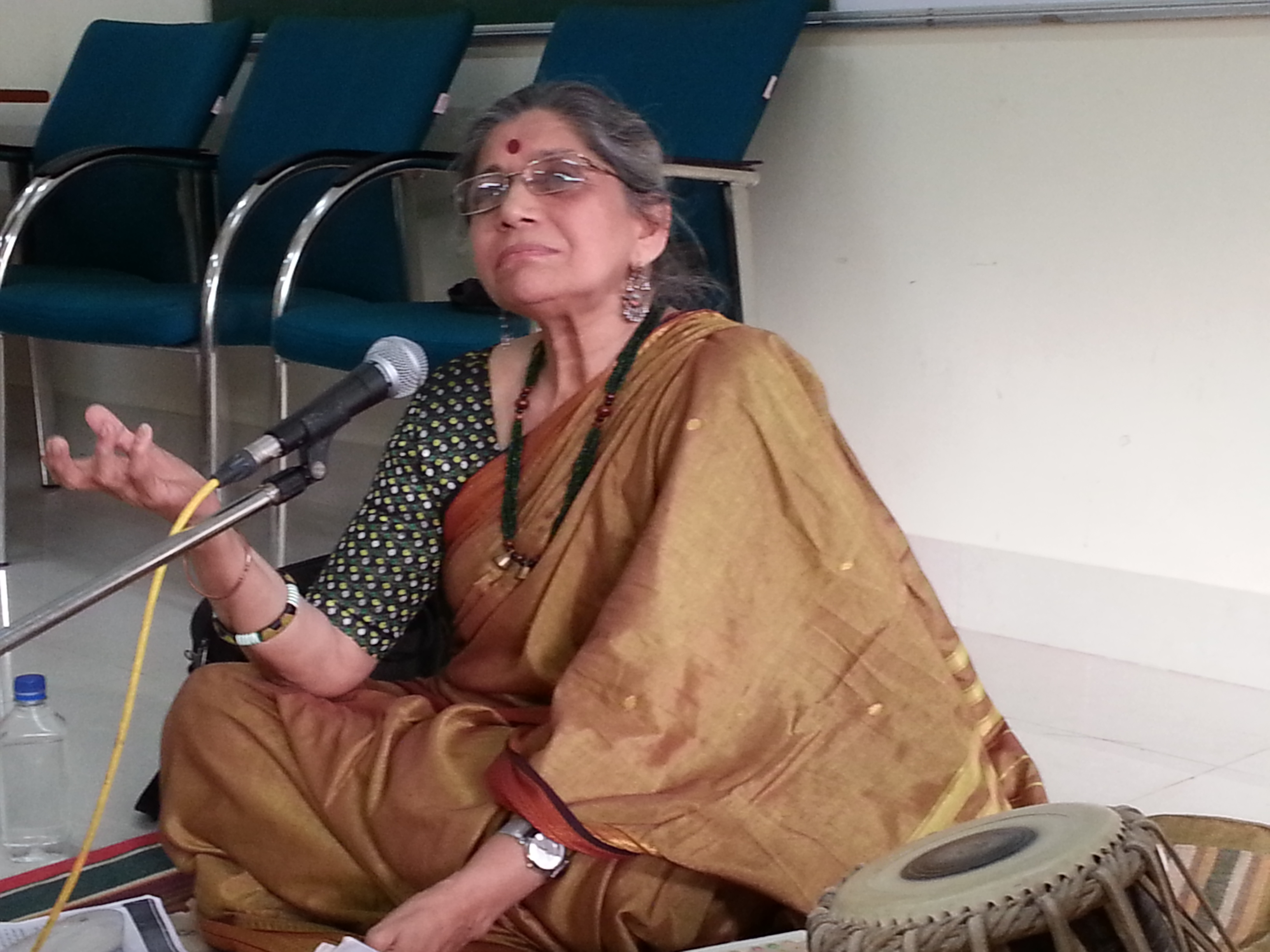 Neela Bhagwat signing at Indian Languages Mela at TISS